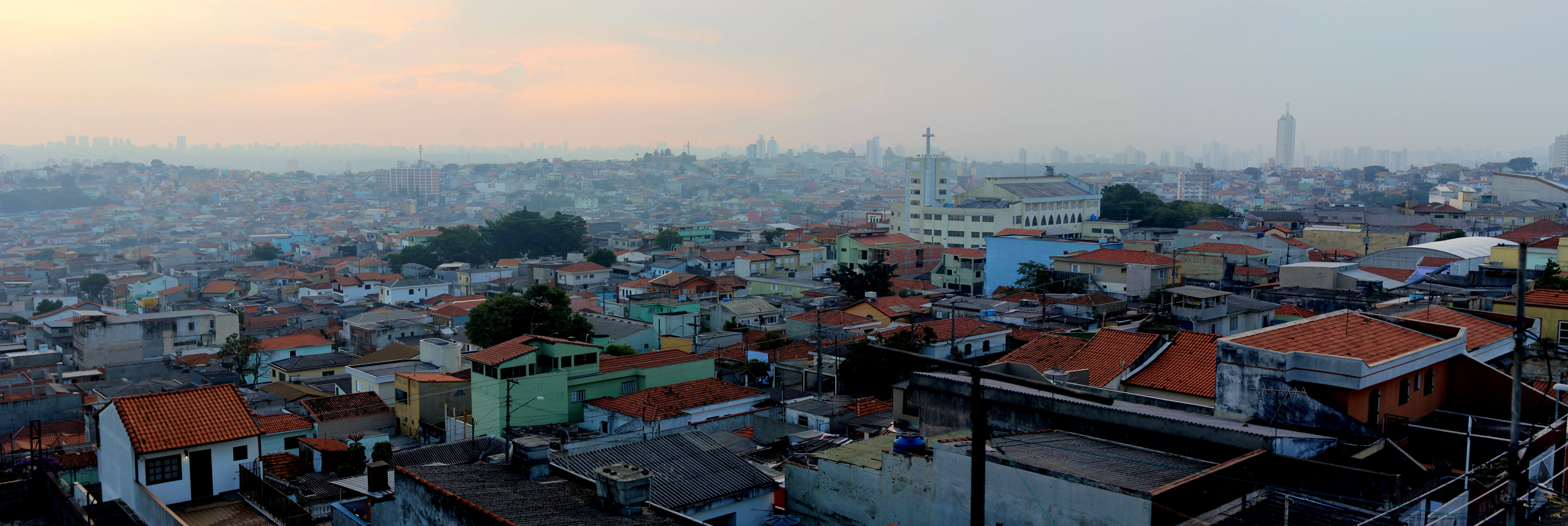 Panorâmica do Bairro Parque São Lucas